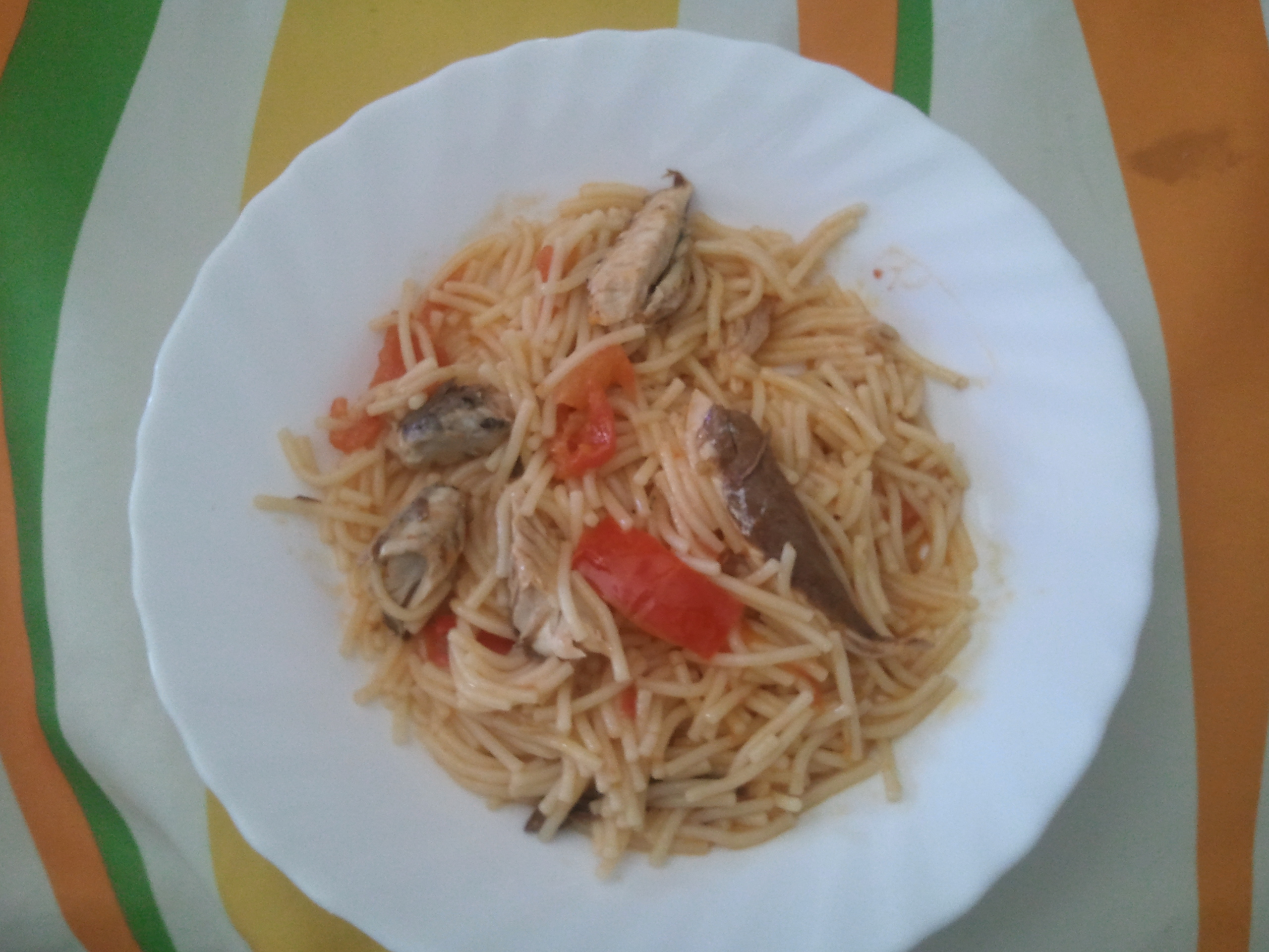 Fideos con caballa, Cádiz, España.